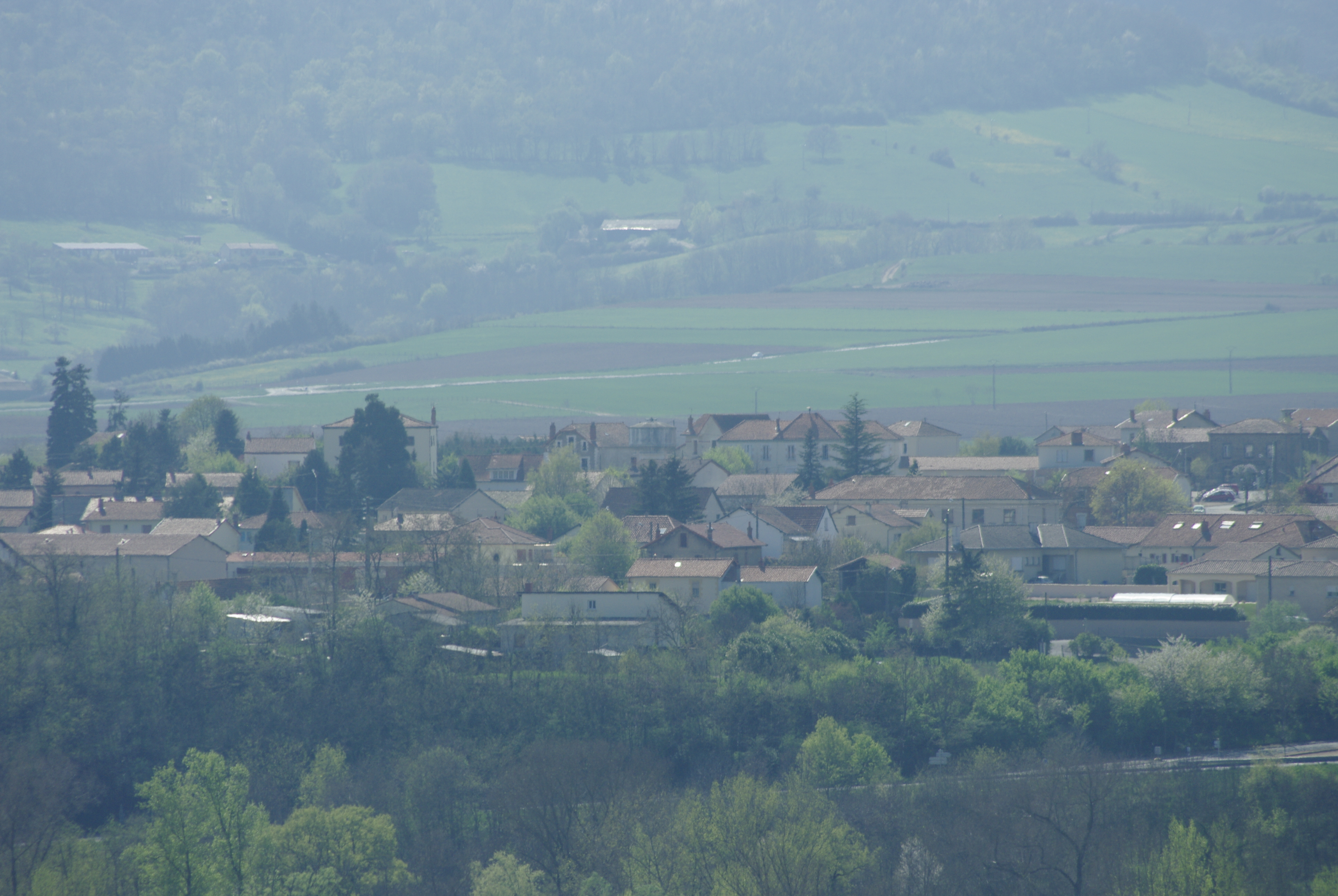 Vue sur la commune de Charbonnier-les-Mines depuis Bayard.